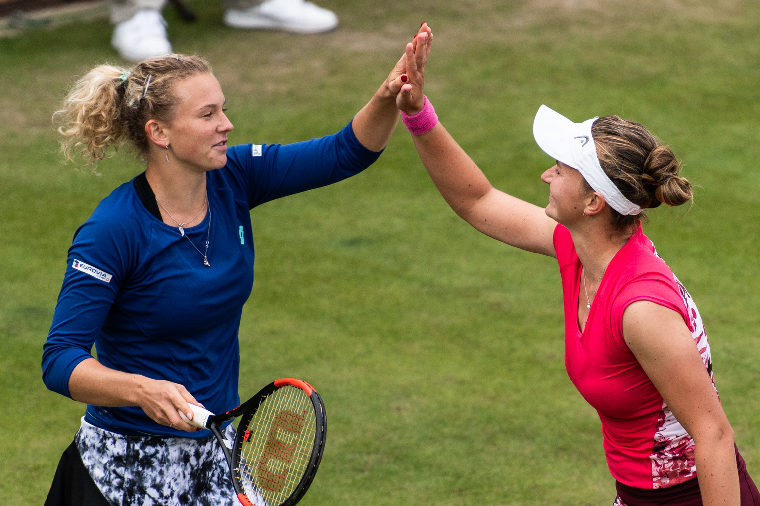 Katerina Siniakova & Barbora Krejcikova